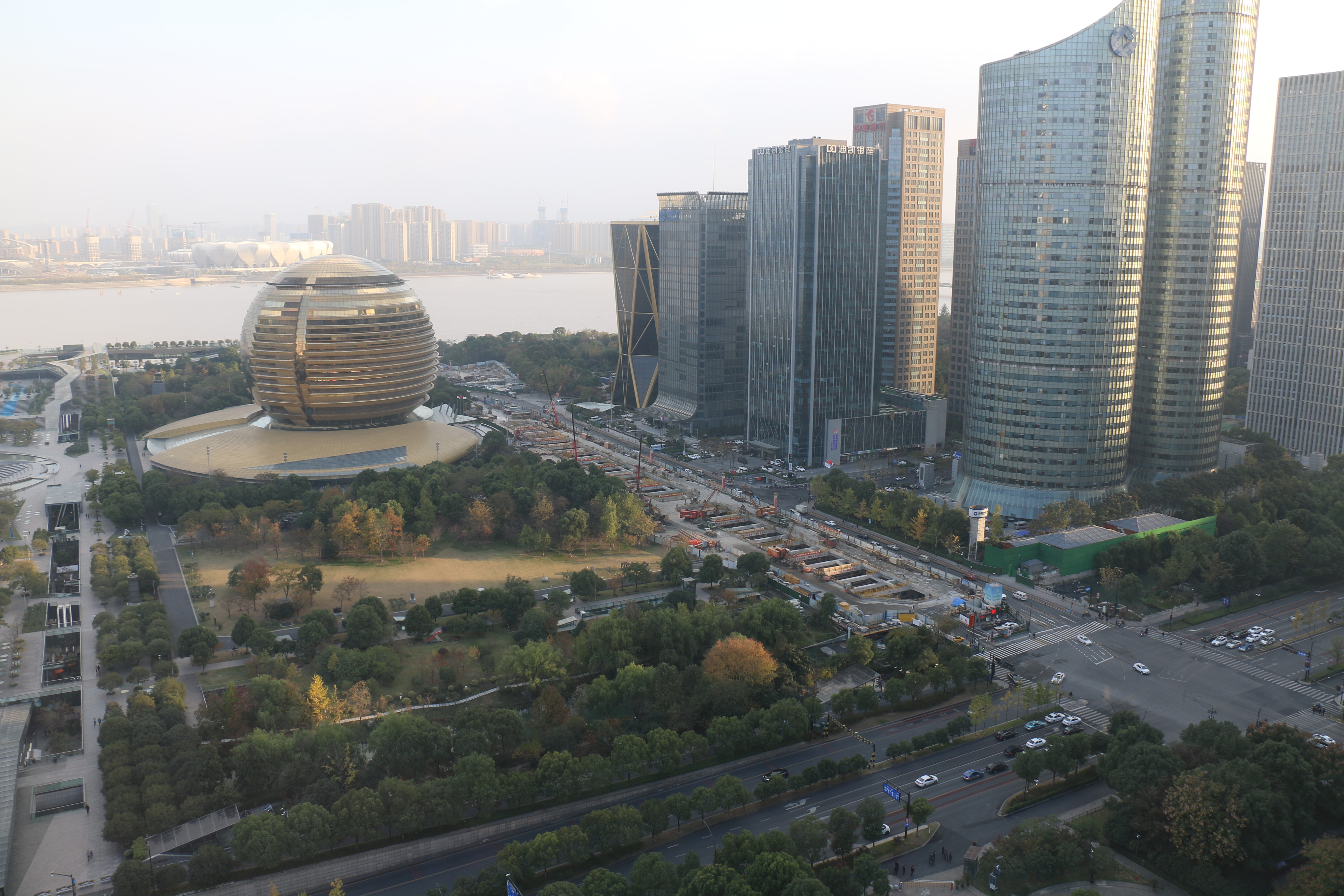 7号线市民中心站工地，2019年11月